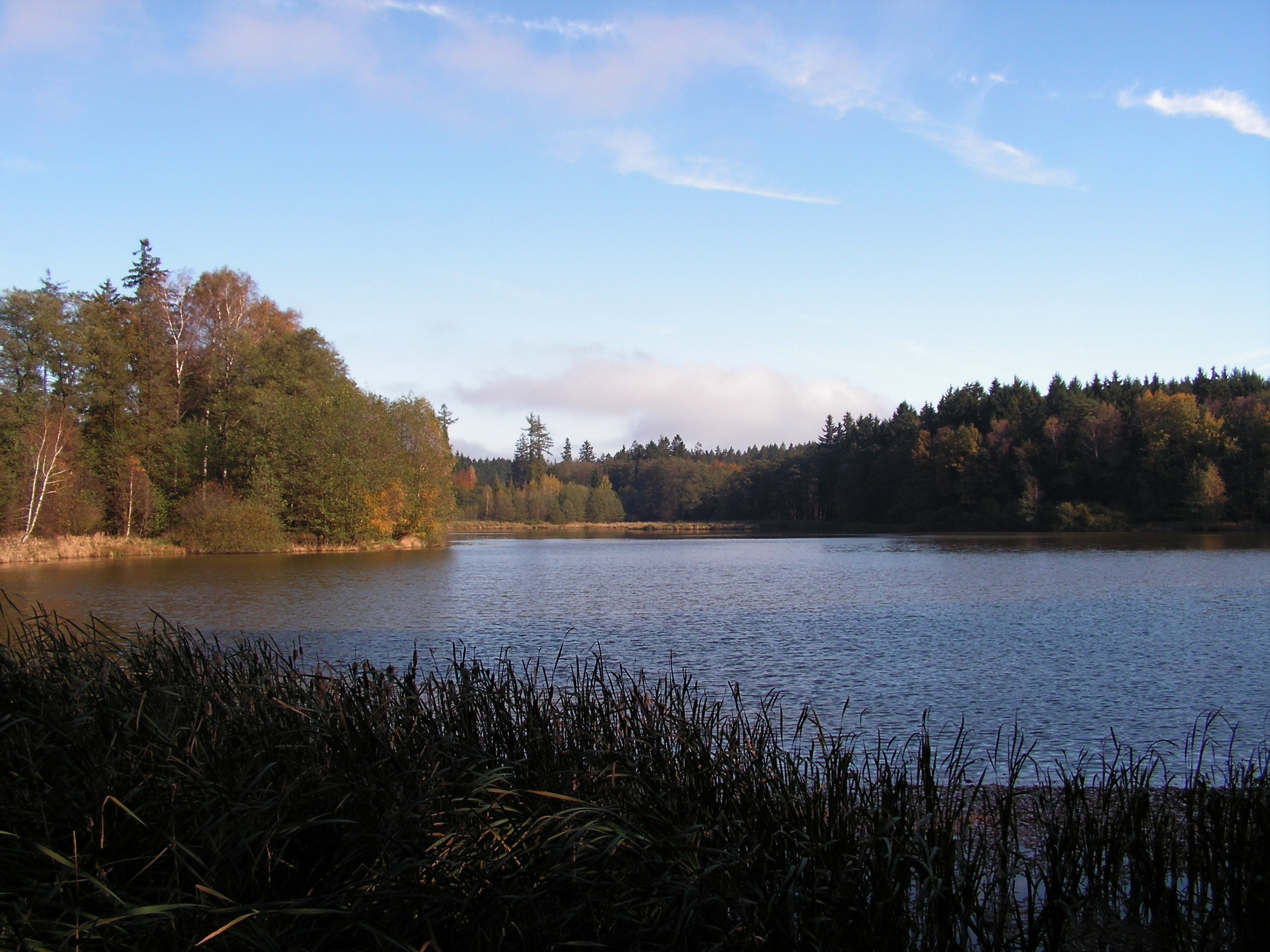 Pohled od hráze na Jilemský rybník, který se nachází západně od Chotěboře v okrese Havlíčkův Brod.